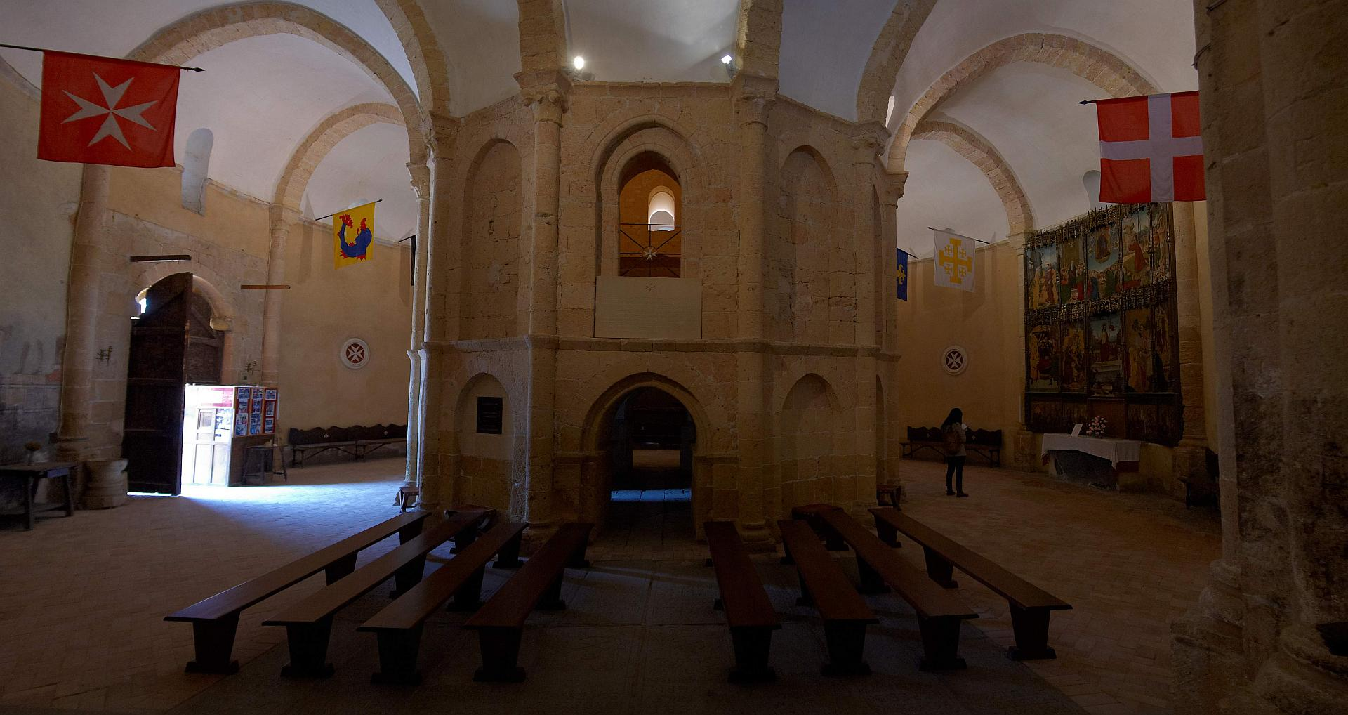 Panoramica de varias tomas verticales para abarcar el interior de la iglesia